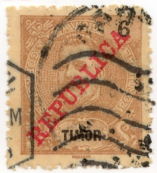 Briefmarke von Portugiesisch-Timor. Royale Briefmarke mit dem Stempel "Republica", 1910/1911 Wert:6 Avos.